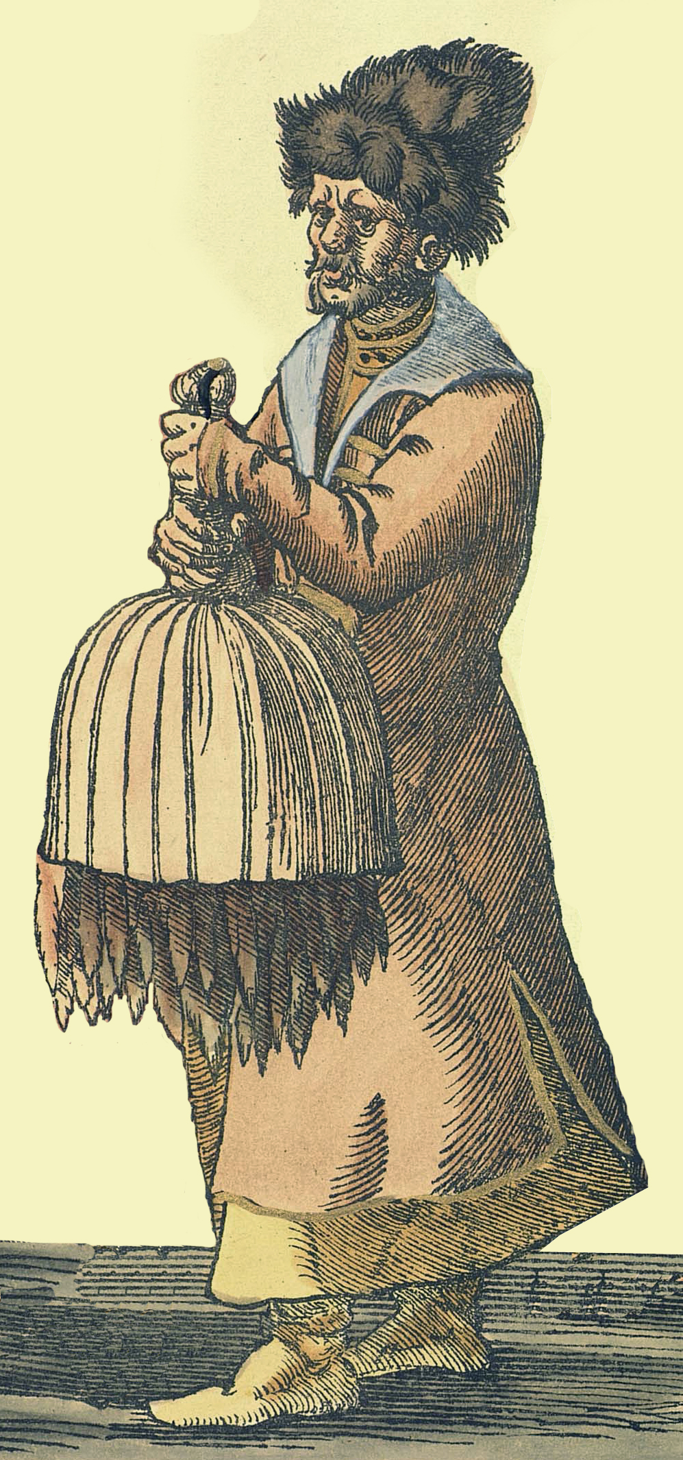 Русское посольство (гравюра 1576 года) cut from File:Russian embassy (1576 engraving) page 1-4 (Rovinskiy).jpg photoshop by user:shakko